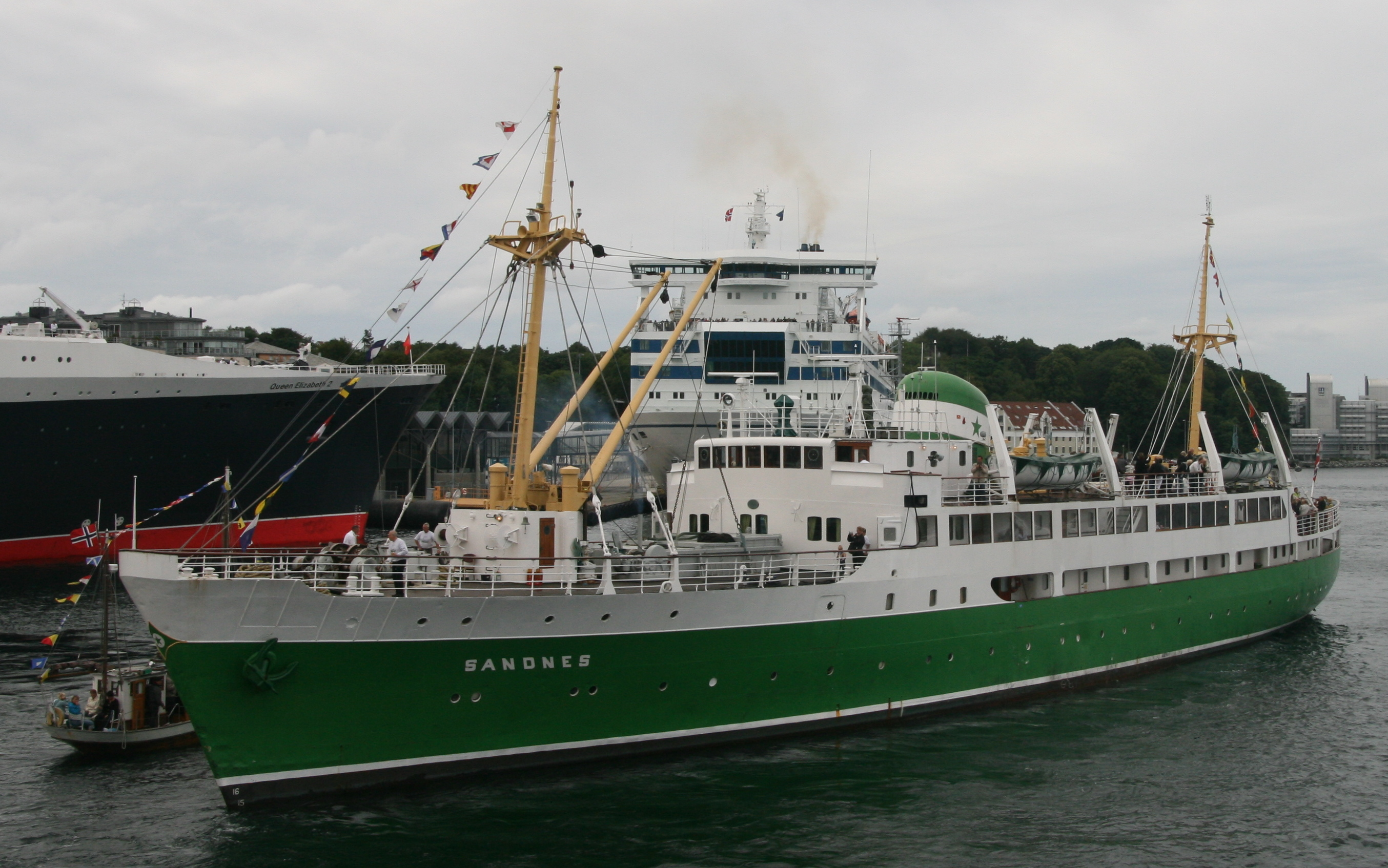 MS Sandnes, bygd i 1950 ved Nylands mekaniske verksted